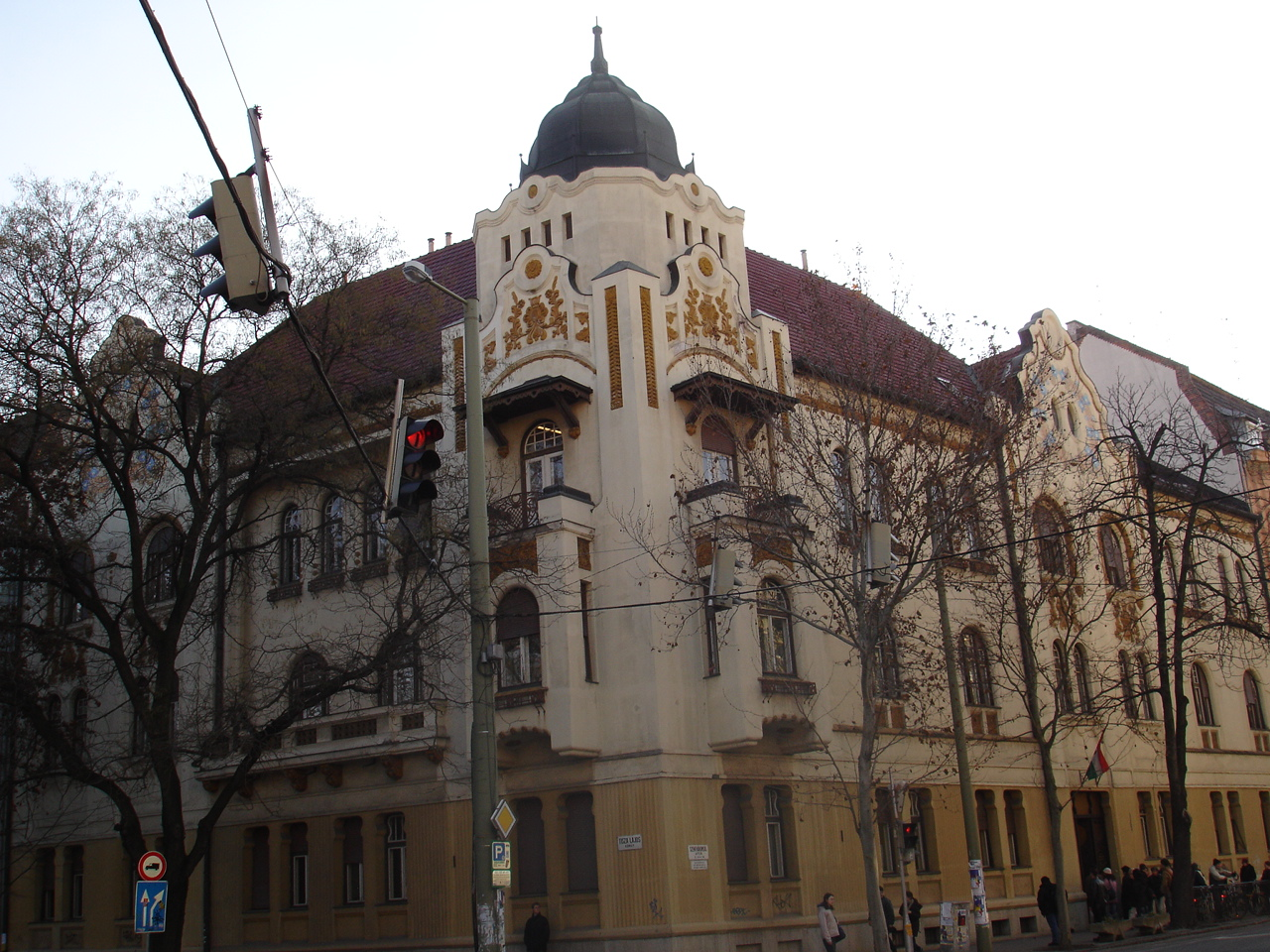 Raicle-palota, Szeged, Szentháromság u. 2-4. Tervezte: Raichl J. Ferenc 1919-1910